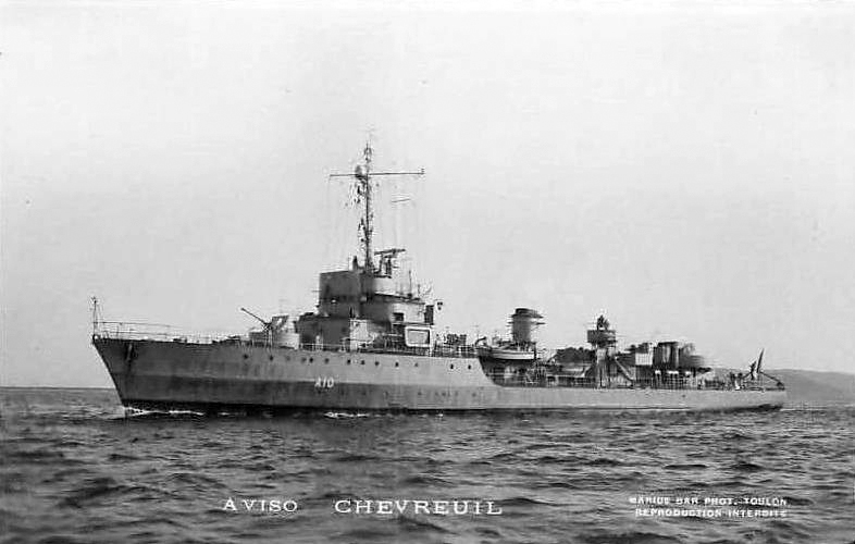 Aviso français Chevreuil, de la classe Chamois, sur lequel a servi Henri Martin en 1946.